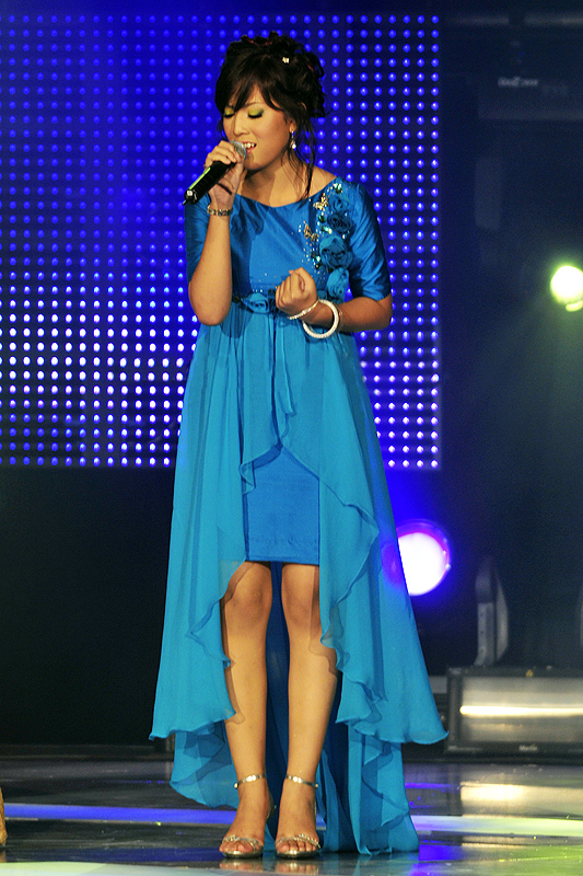 Shila at Anugerah Industri Muzik 16 (AIM 16) @ Dewan Merdeka, PWTC 2 May 2009